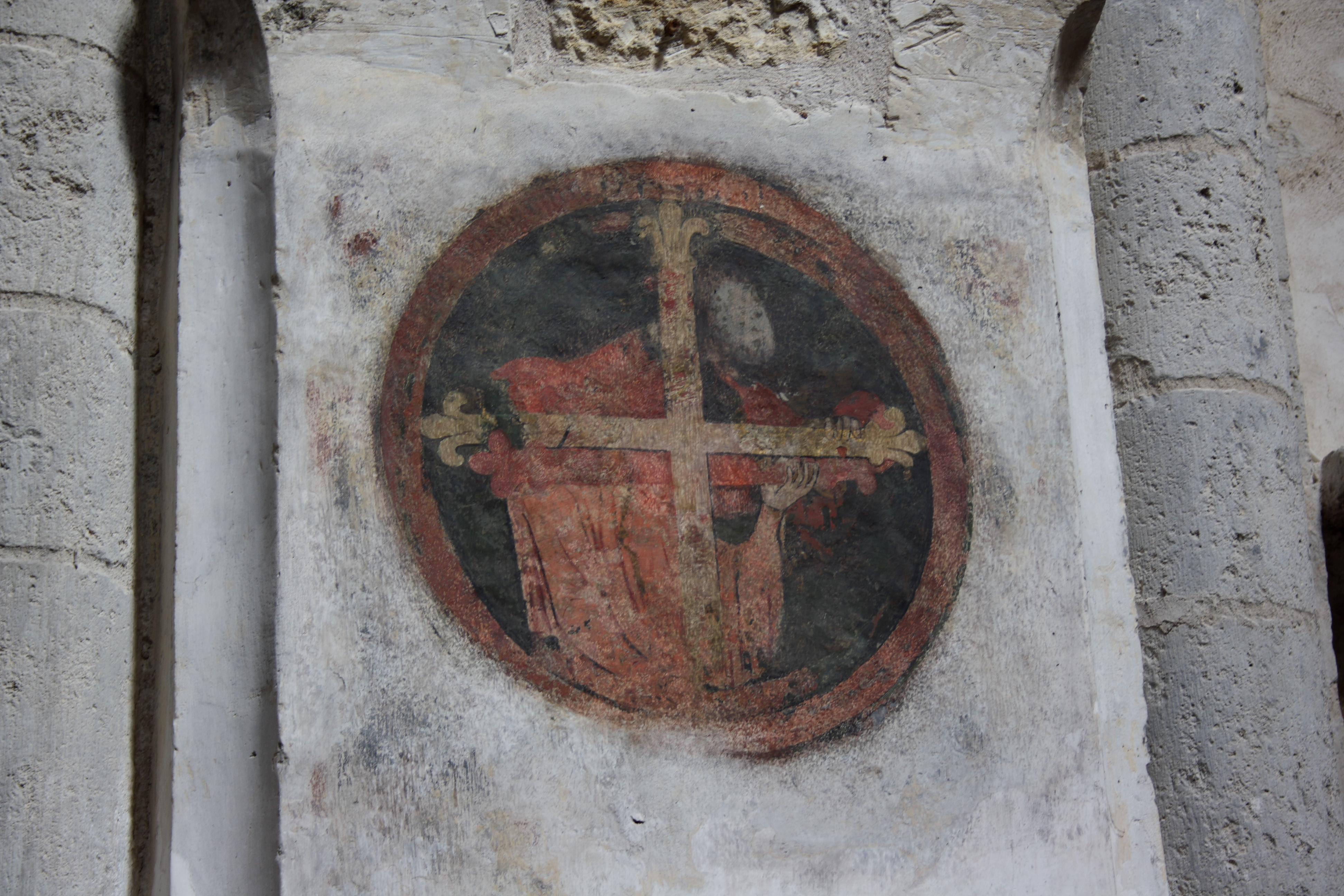 Katholische Pfarrkirche Notre-Dame-du-Fort in Étampes im Département Essonne in der Region Île-de-France (Frankreich), Malerei auf einer Säule Object location48° 26′ 05.89″ N, 2° 09′ 51.01″ E